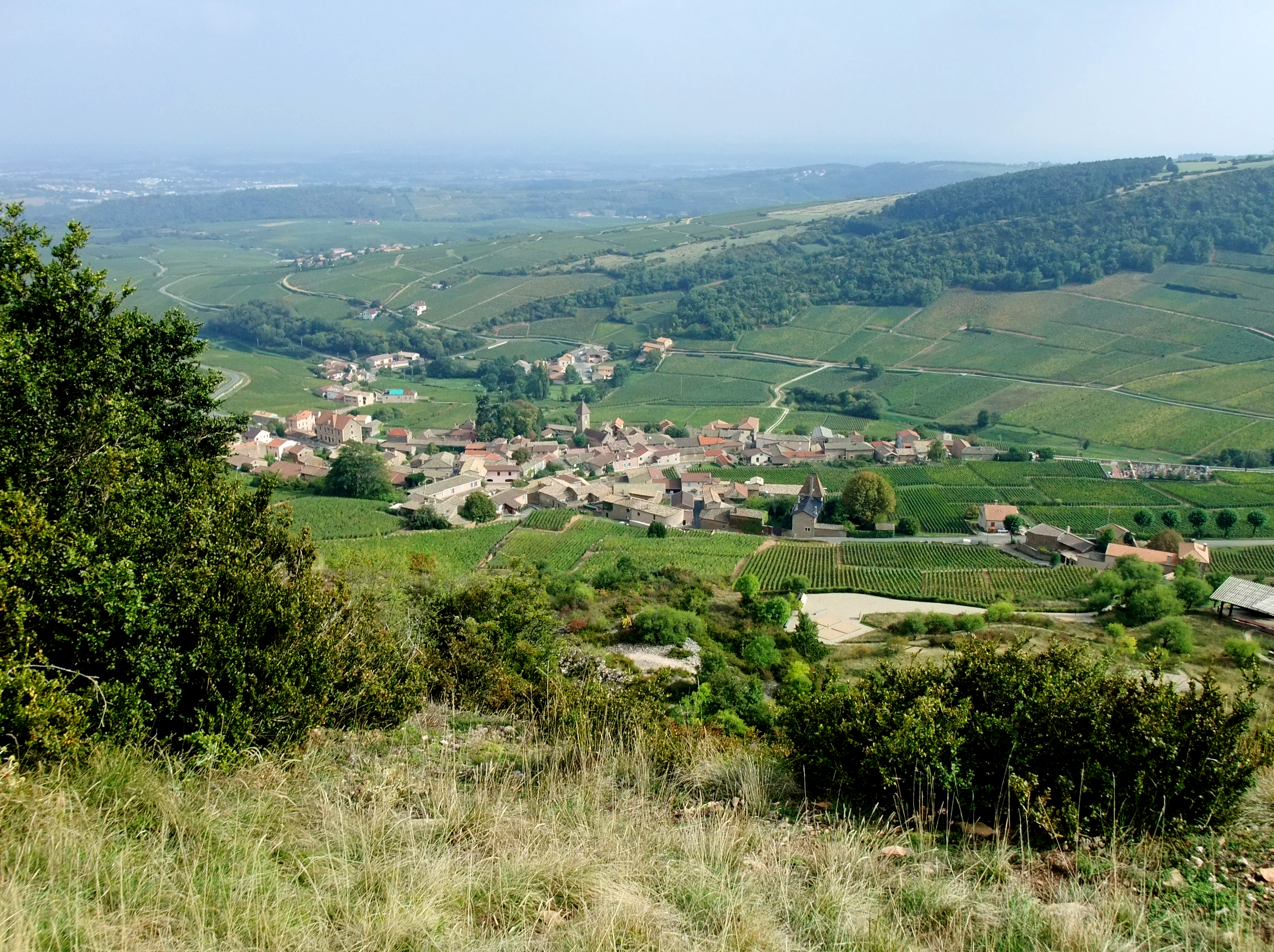 Blick vom Felsen auf Solutré, Burgund, Frankreich